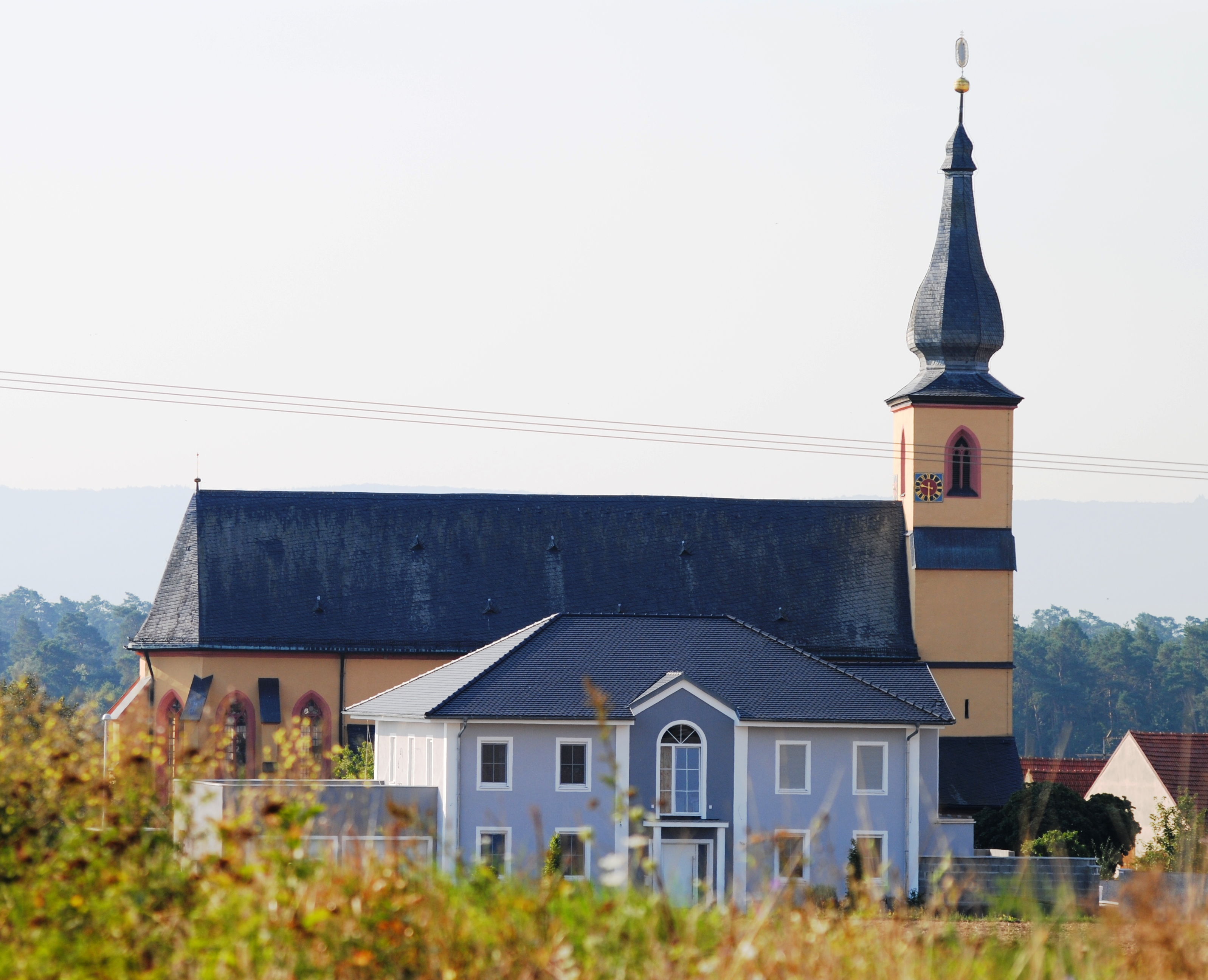 St. Maria de Rosario, Dimbach-Volkach